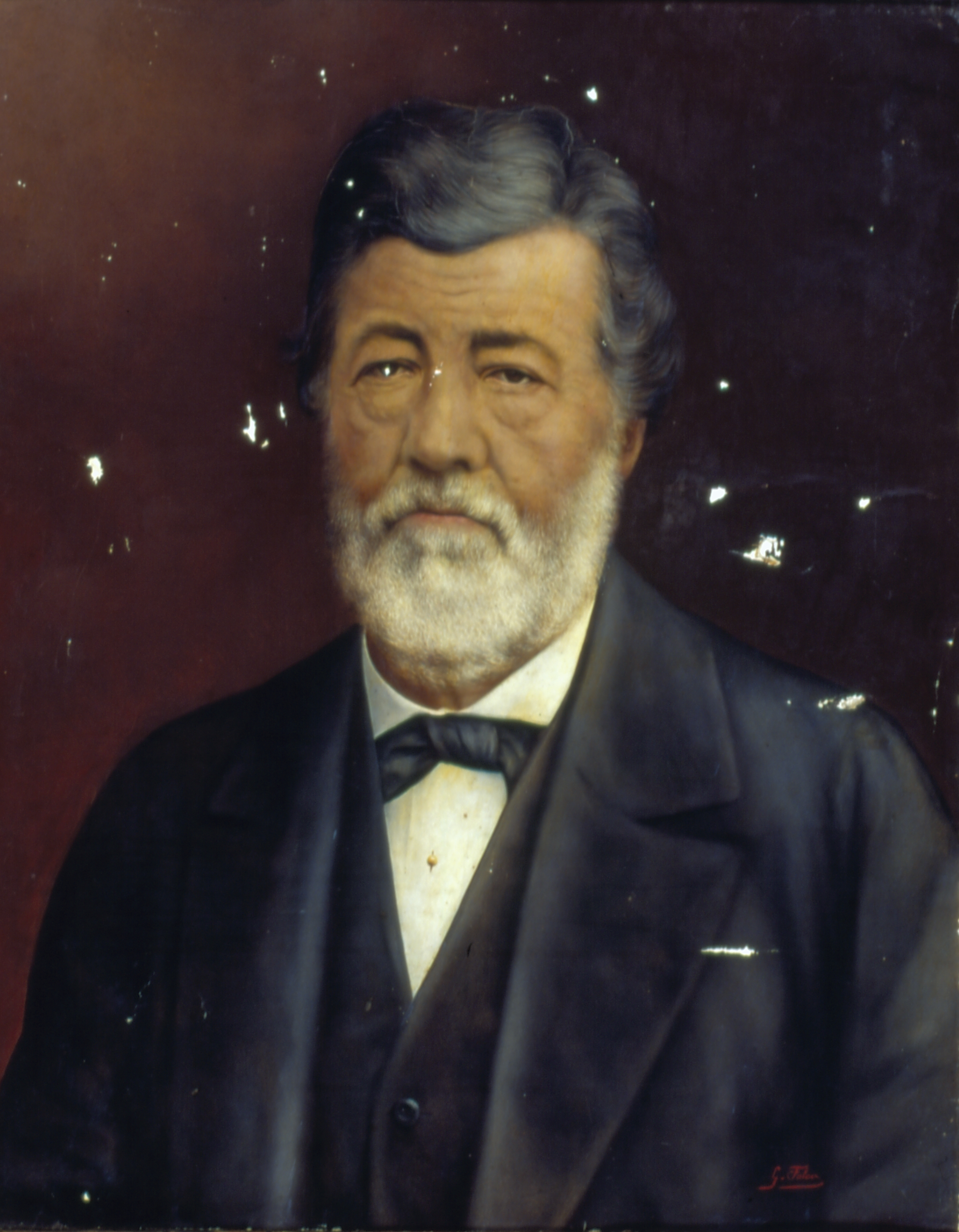 Obra que integra o acervo do Museu Paulista da USP.